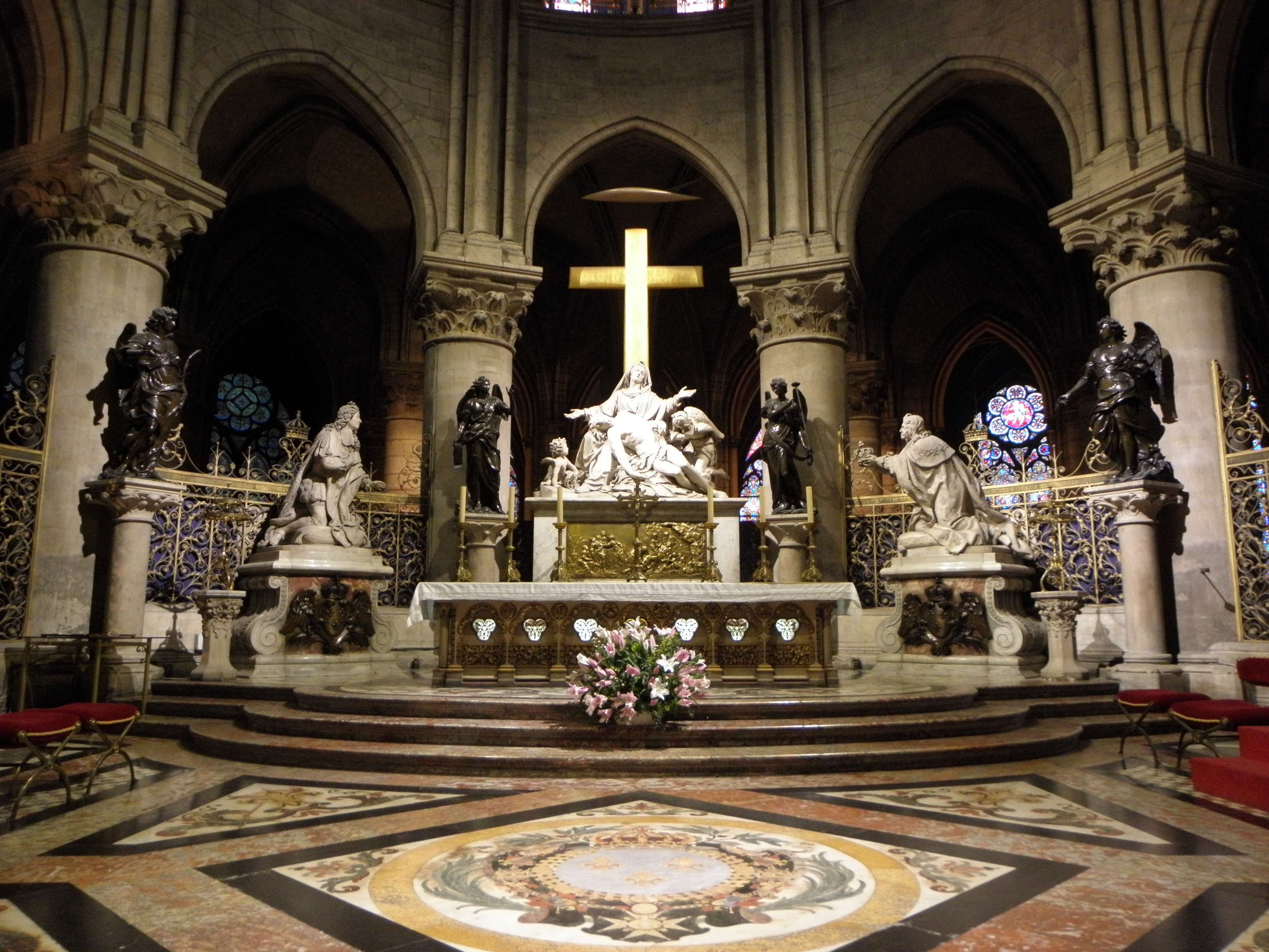 Groupe sculpté de la Descente de Croix (Nicolas Coustou), Mise au tombeau (François Girardon), statues de Louis XIII (Guillaume Coustou) et Louis XIV (Antoine Coysevox ). Chœur de la cathédrale métropolitaine Notre-Dame de Paris (75).